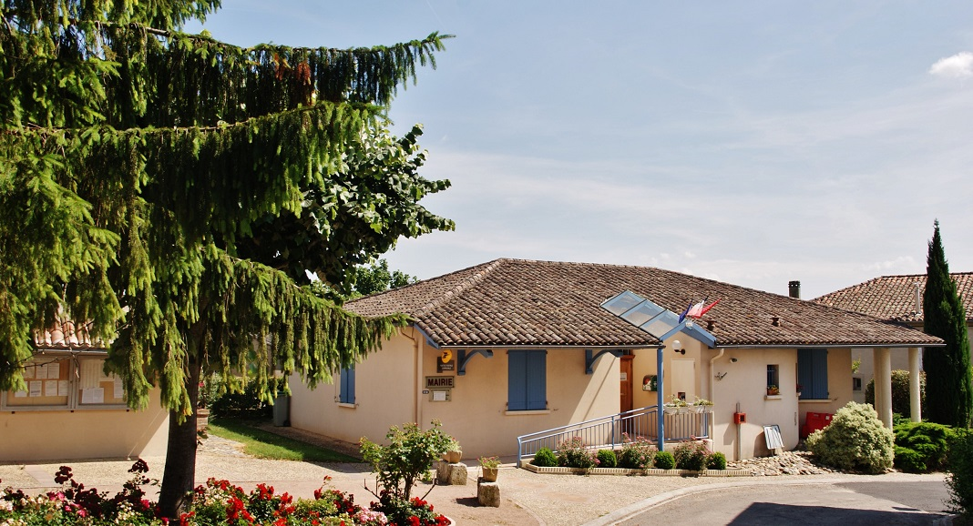 La Mairie